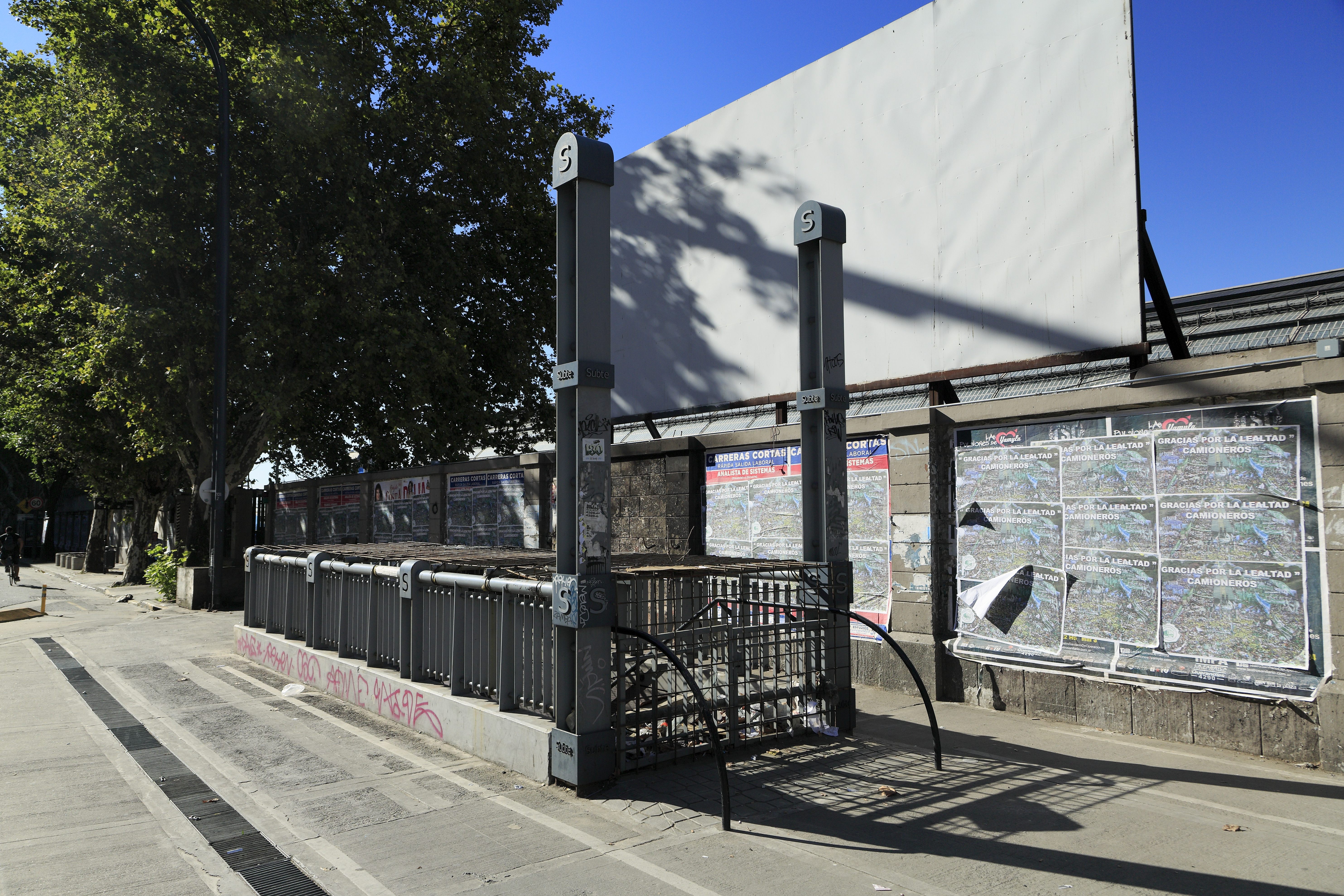 Avenida del Libertador, neben dem Bahnhof Retiro Mitre. Die Streckenverlängerung ist schon länger nahezu fertig, doch wegen Streitigkeiten zwischen Stadtverwaltung und Betreiber Metrovías wurde sie noch immer nicht in Betrieb genommen.